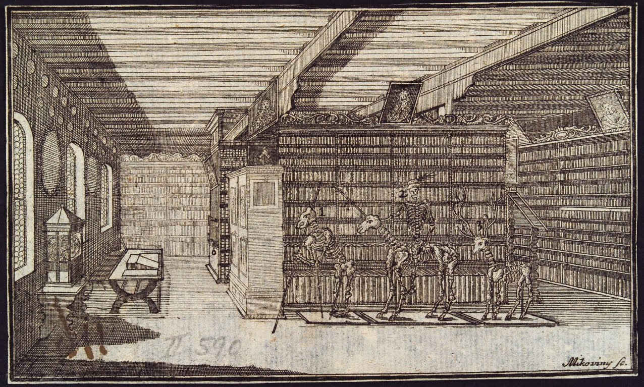 Bibliotheca Publica Universitatis Altdorfinae, Taf. XII. In: Das Merckwürdigste von der löbl. nürnbergischen Universität-Stadt Altdorff : in verschiedenen Kupffern u. e. kurtzen Beschreibung nebst e. Land-Chärtlein d. nürnberg. Territorii u. angräntzenden Oertern fürgestellet / daselbst zu finden bey Ernst Friederich Zobel. Altdorf : Zobel, 1723.